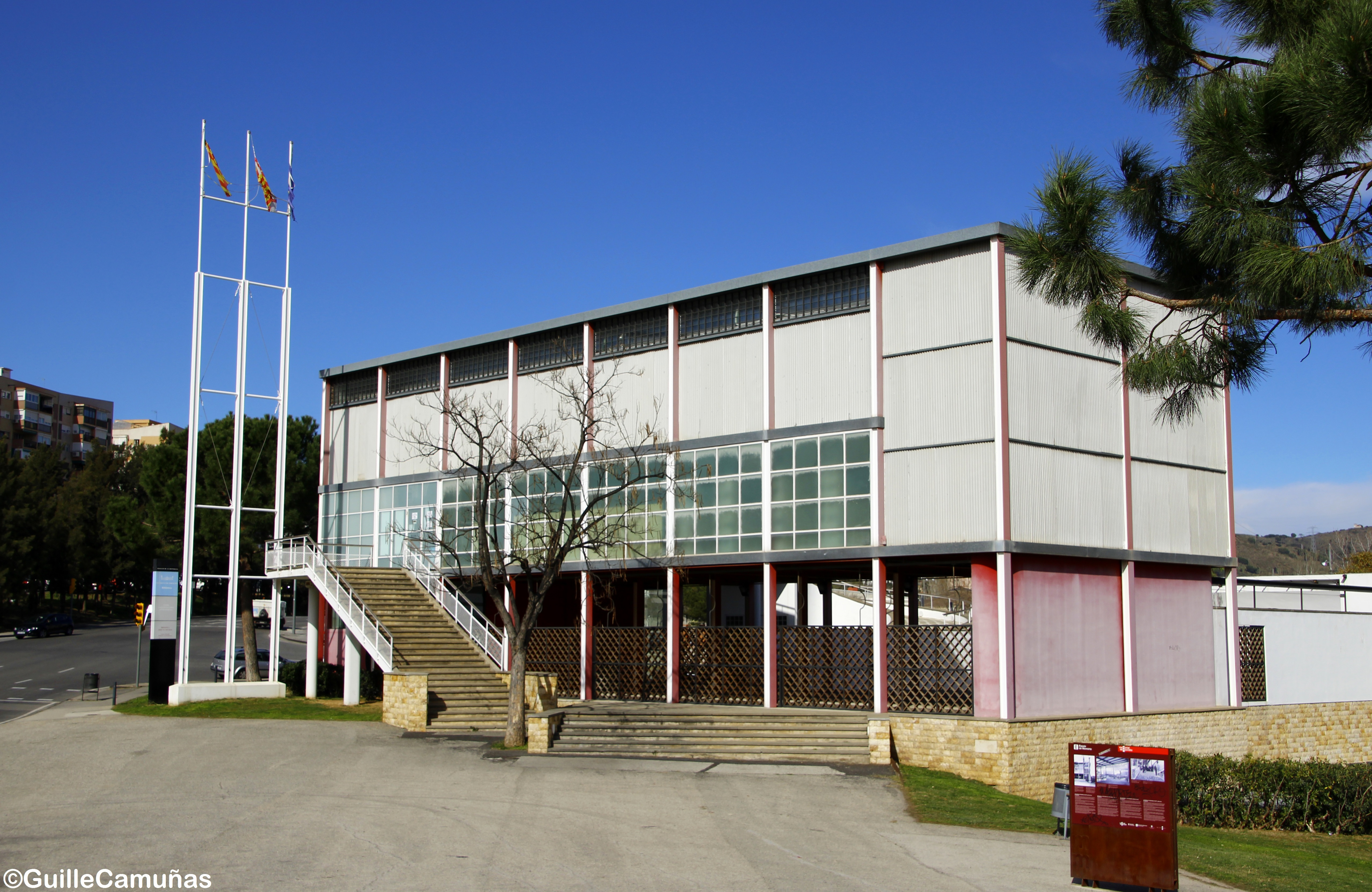 Pavelló general